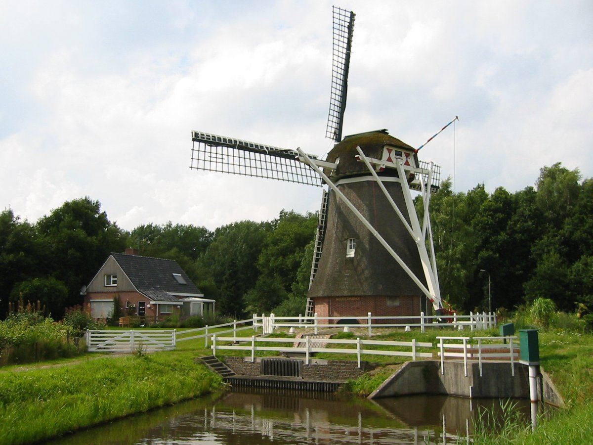 Weddermarke/ Ten-Bruggencatenummer: 00590: Achtkante grondzeiler van opzij gefotografeerd (opmerking: Foto gemaakt in het kader van het project Actualisering Monumentenregister (AMR).)